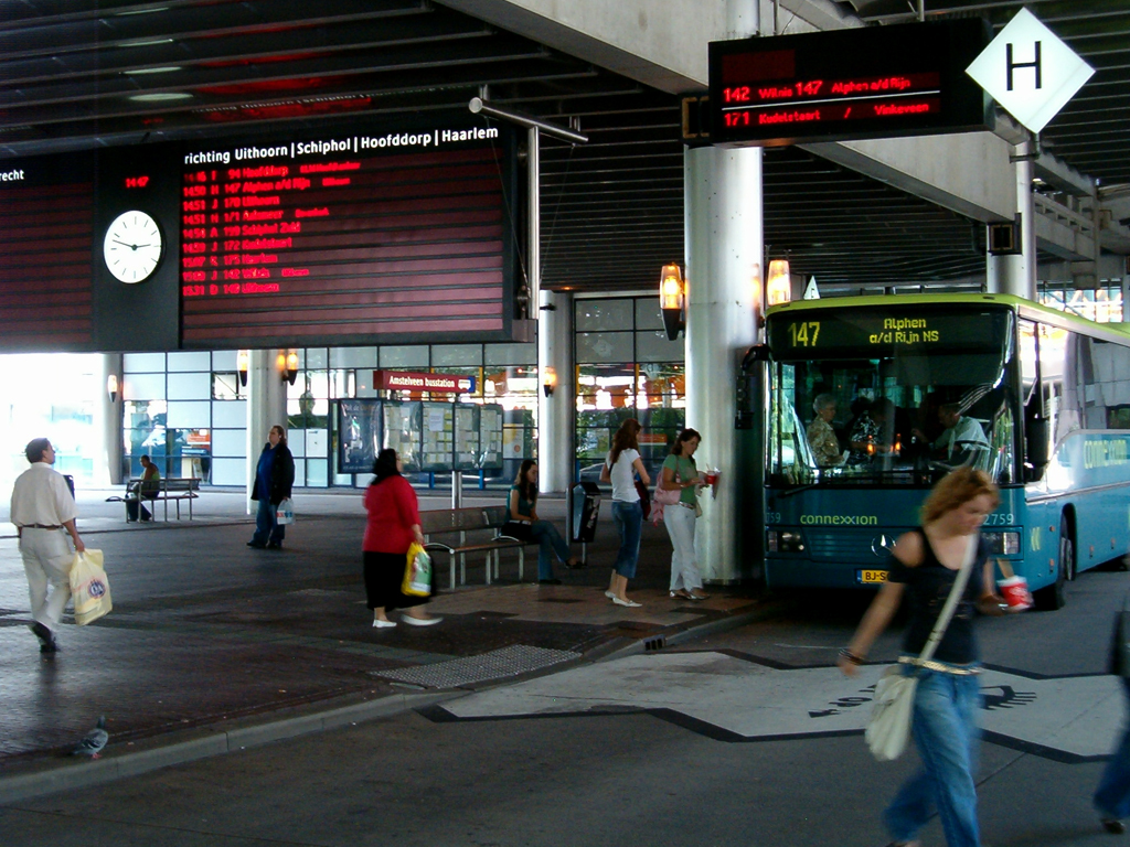 Busstation Amstelveen Nederland (coach station Amstelveen, The Netherlands)